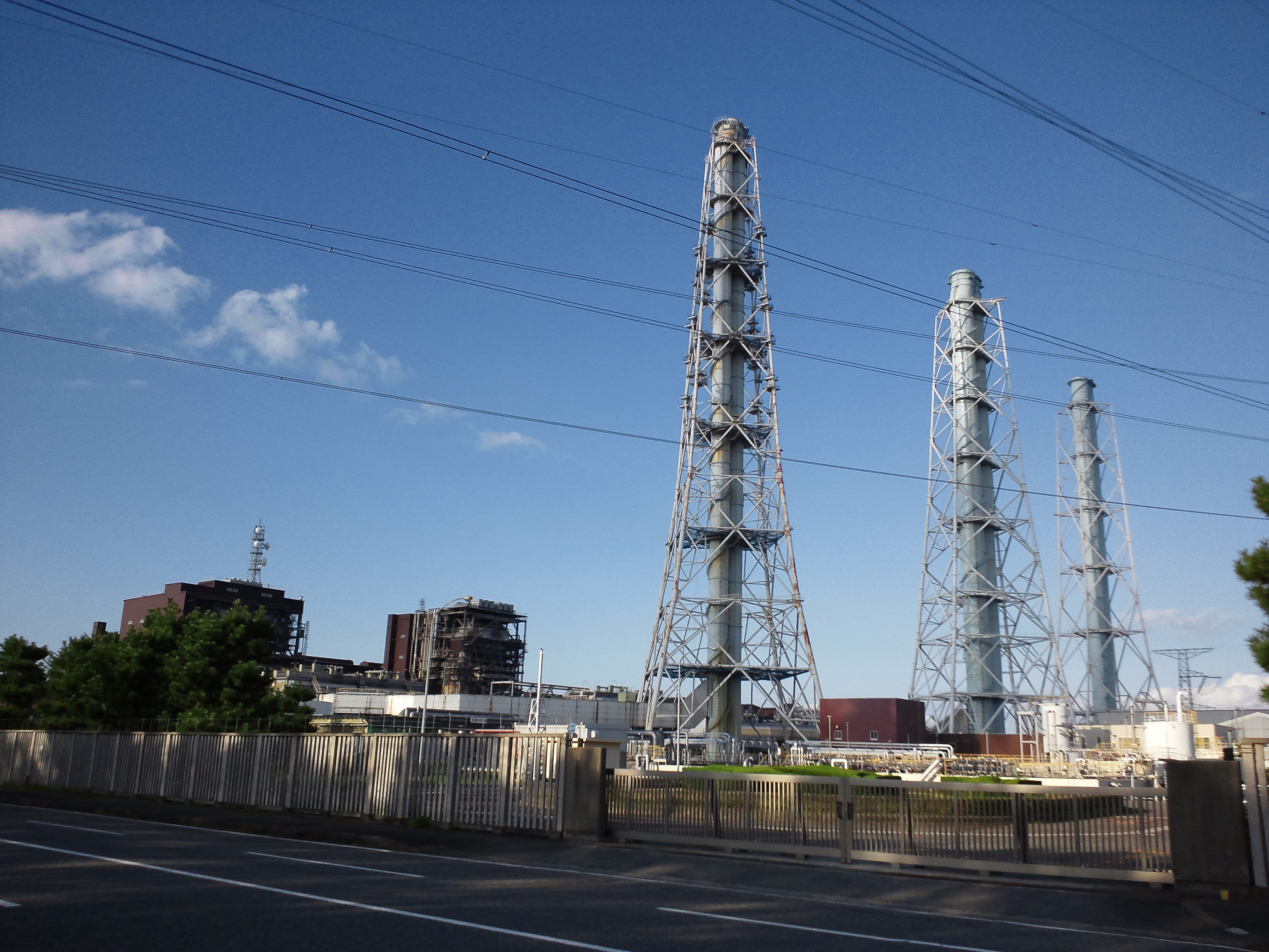 東北電力東新潟火力発電所